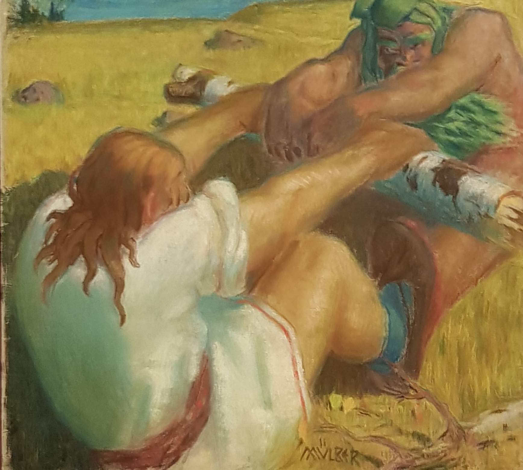 Aleksander Mülber - Kalevipoeg et Sorts luttant (vers 1915) Pastel sur papier Musée d'Orsay - Exposition "Âmes sauvages" (2018) Collection du musée d'Art d'Estonie